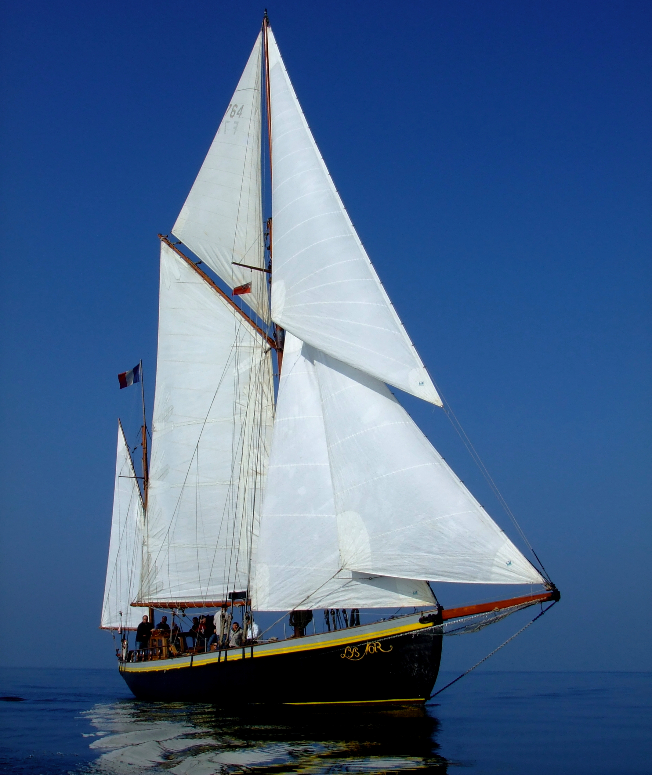 voilier français de 1914, le Lys Noir, basé à Granville (Manche)